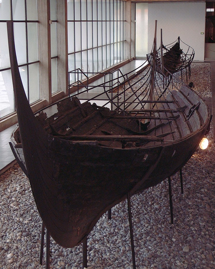 Skuldelev III: Ein wikingerzeitliches Fracht- und Reiseschiff, das im Roskilde-Fjord in der Nähe von Skuldelev gefunden wurde.